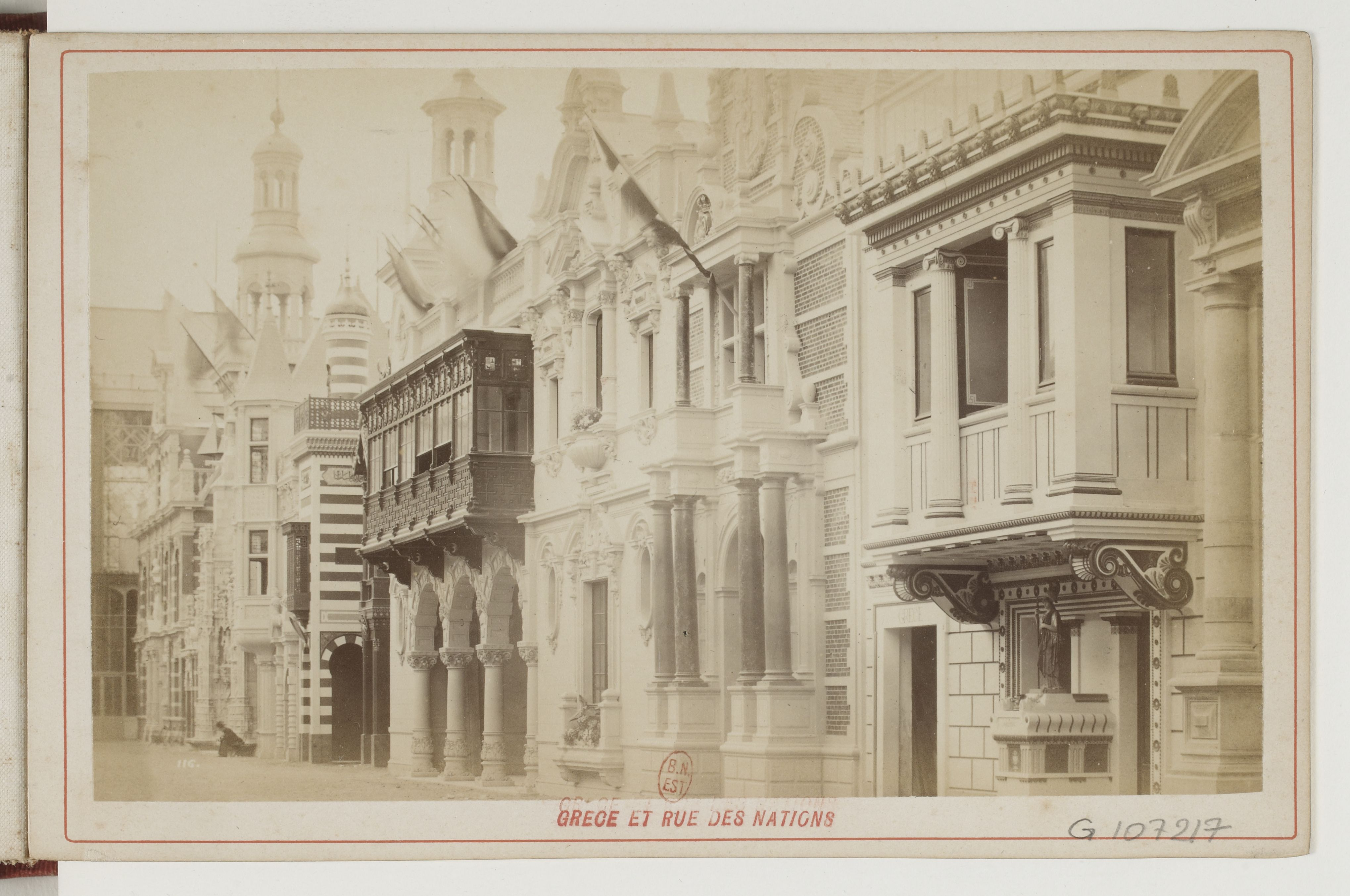 Vue des façades nationales composant la rue des nations à l'exposition universelle de 1878 à Paris